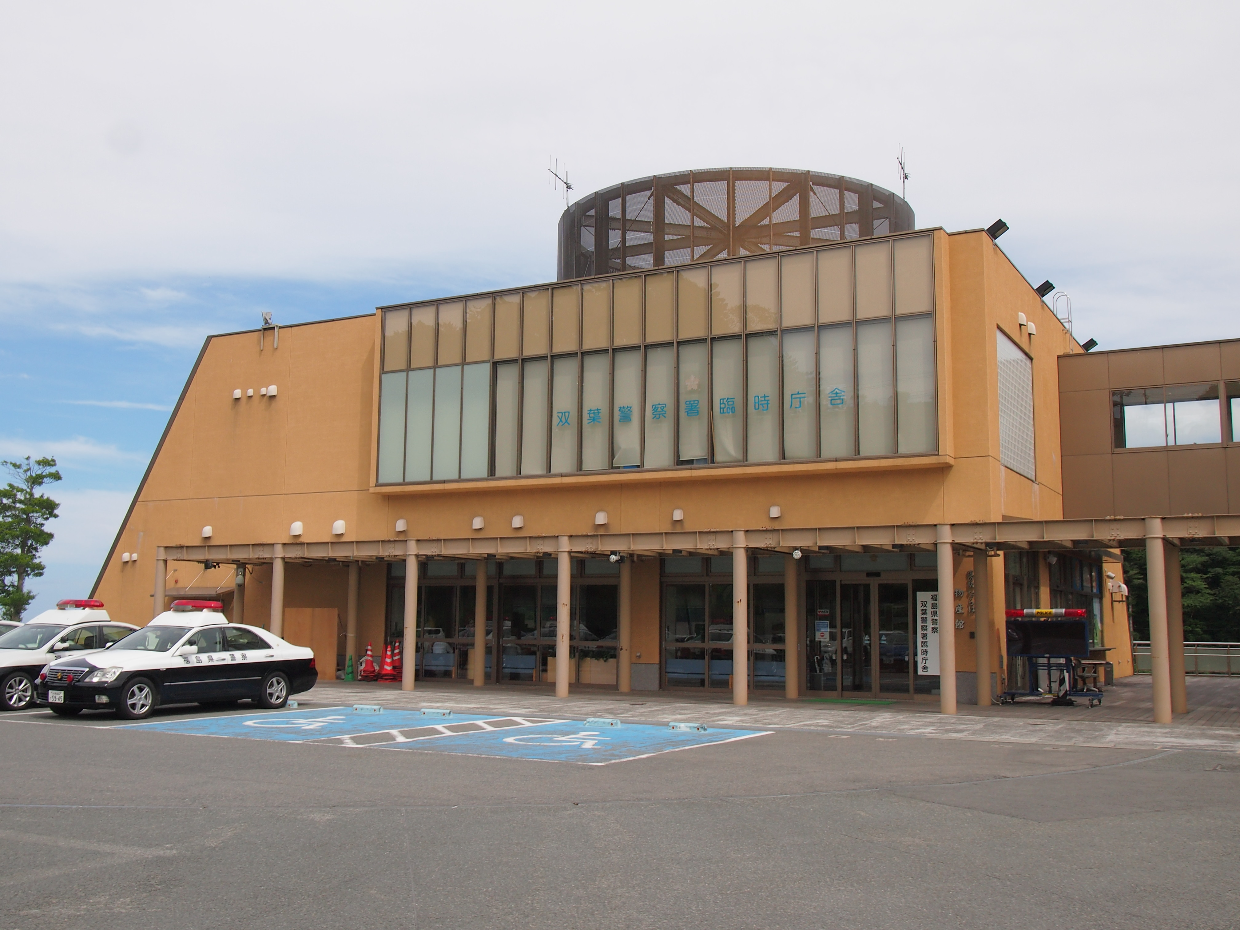 道の駅「ならは」に設置されている双葉警察署の臨時庁舎の正面